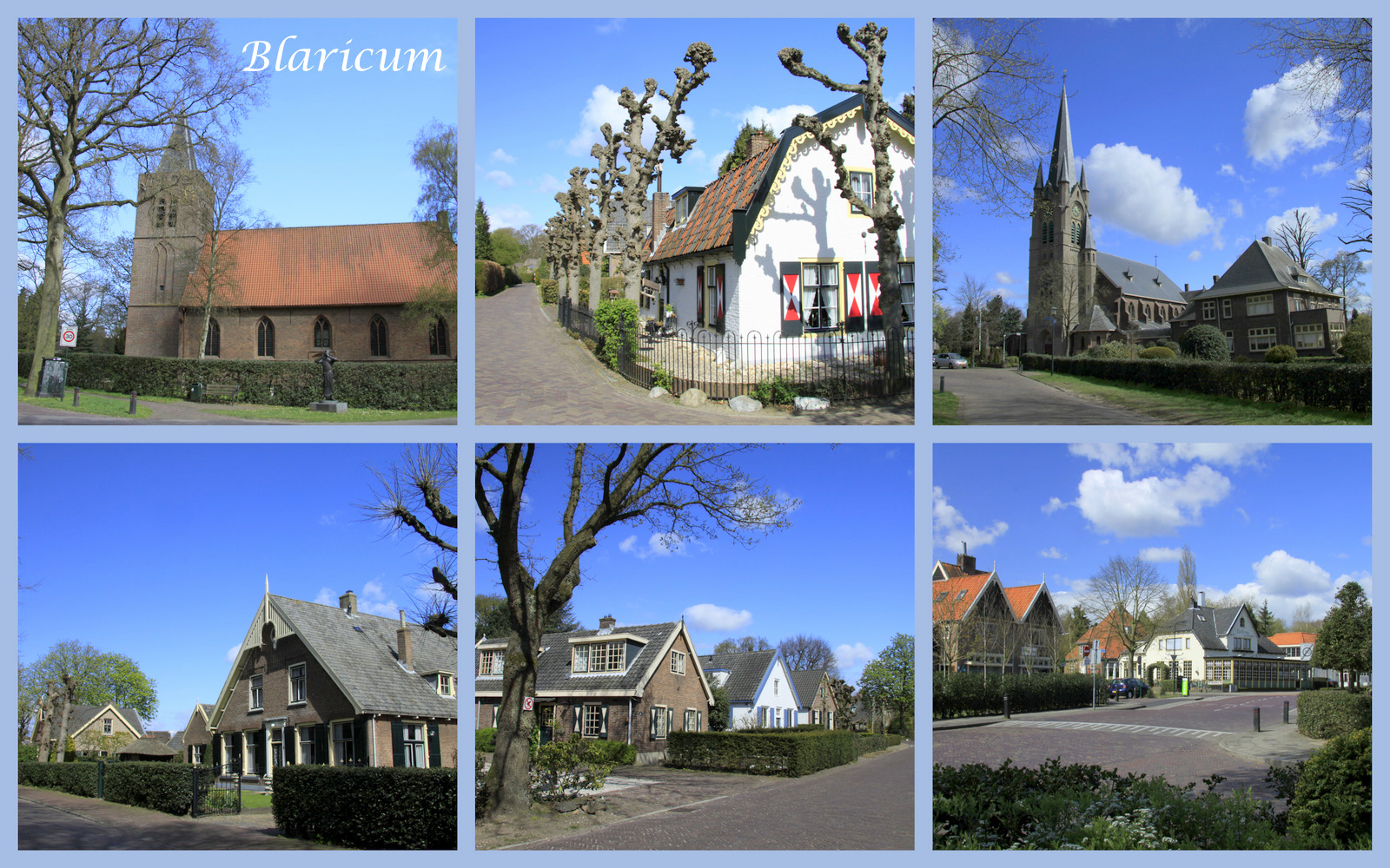 Blaricum een mooi ruim en landelijk dorp.